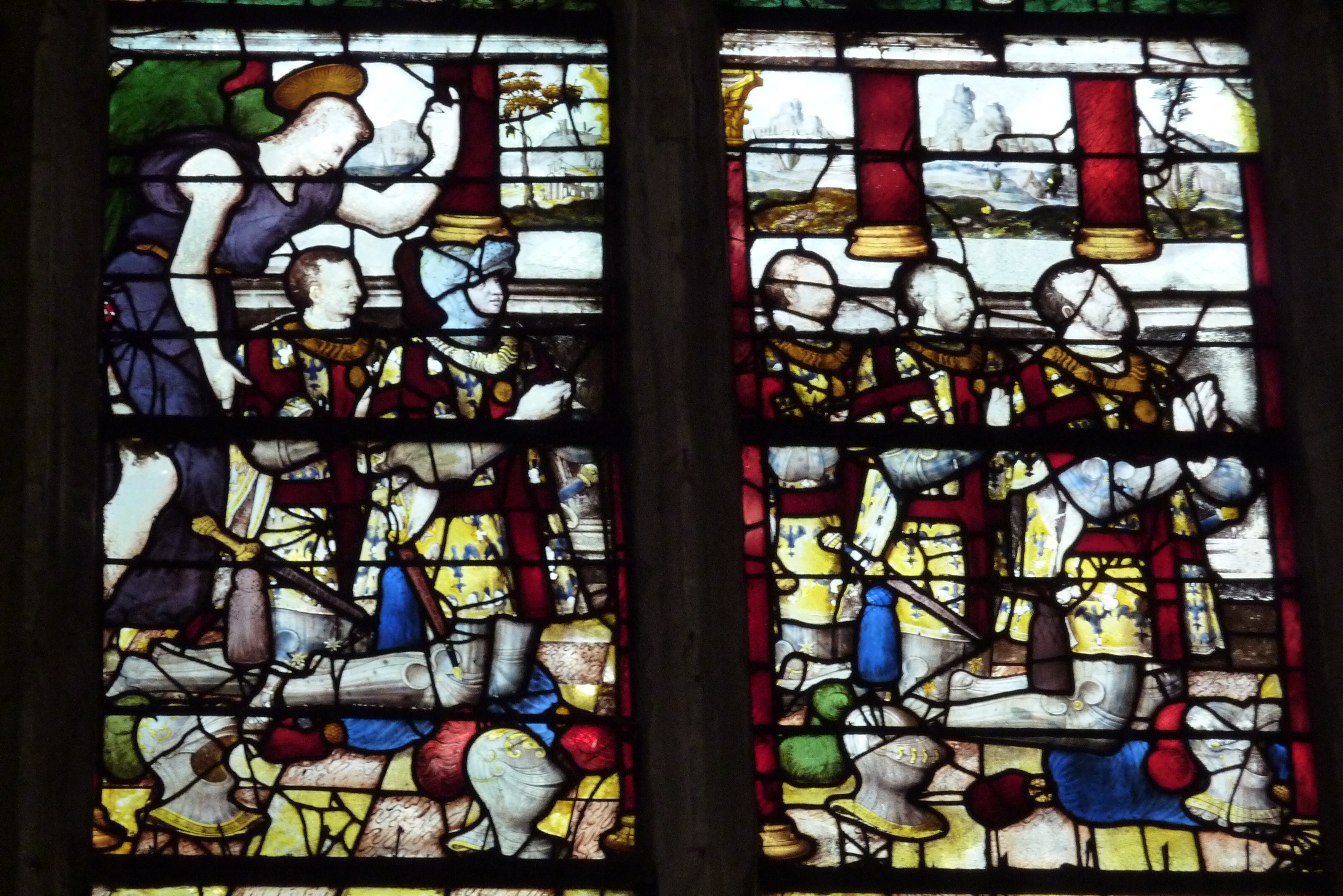 Ausschnitt des Bleiglasfensters Nr. 13 (von 1563) in der katholischen Pfarrkirche Saint-Martin (Collégiale Saint-Martin) in Montmorency, Darstellung: fünf Söhne von Anne de Montmorency (siehe: Dominique Foussard, Charles Huet, Mathieu Lours: Églises du Val-d'Oise. Pays de France, Vallée de Montmorency, Société d'Histoire et d'Archéologie de Gonesse et du Pays de France, 2. Auflage, Gonesse 2011, ISBN 9782953155426)